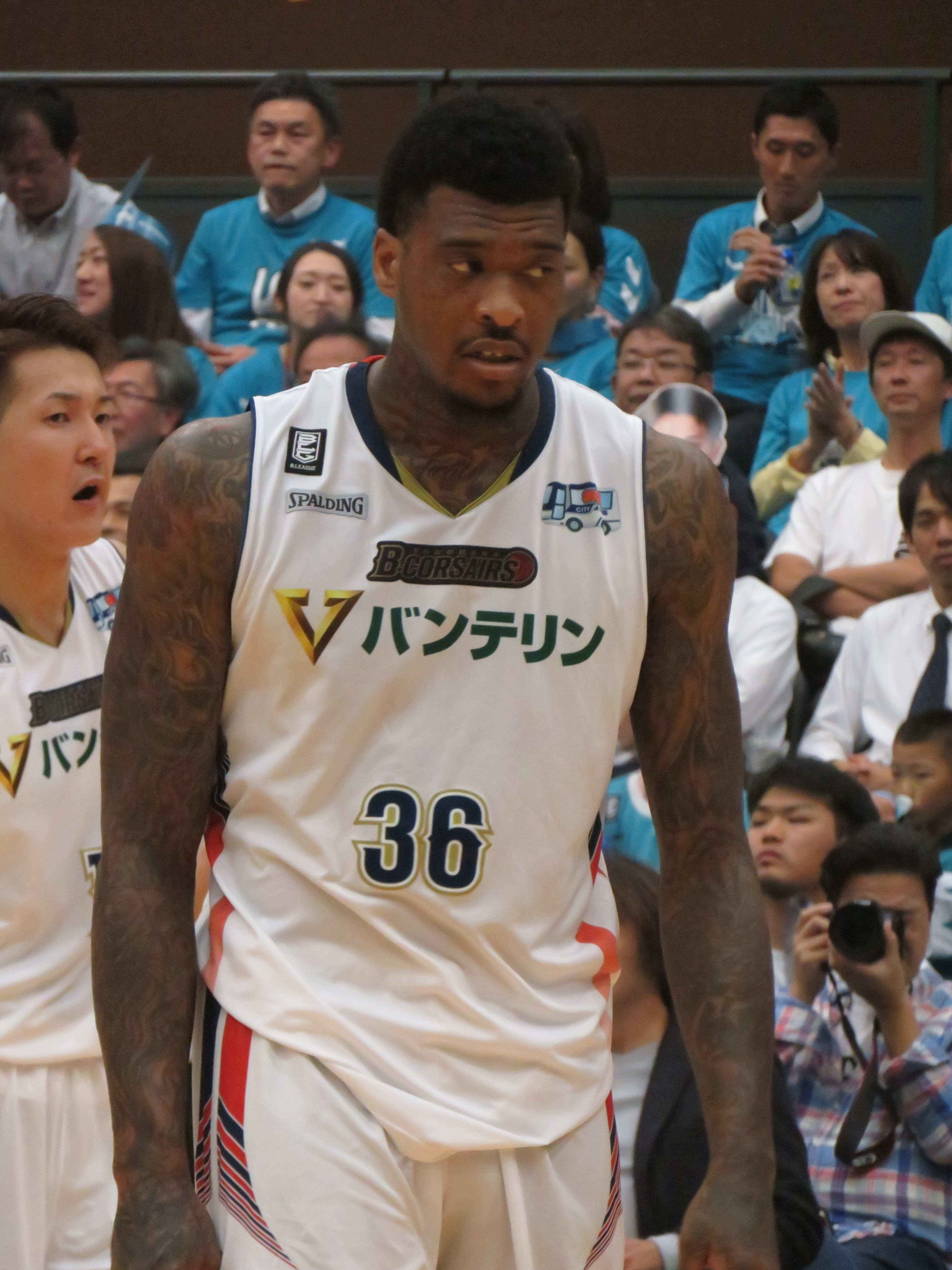 2018年10月12日撮影 2018-19 B1 第二節 京都-横浜 ハンナリーズアリーナ